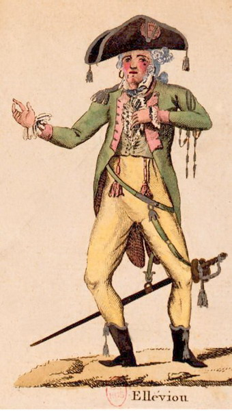 Le ténor Jean Elleviou dans L'Irato de Étienne-Nicolas Méhul (1801)